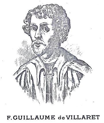 Portrait de Guillaume de Villaret, grand maître de l'ordre de Saint-Jean de Jérusalem